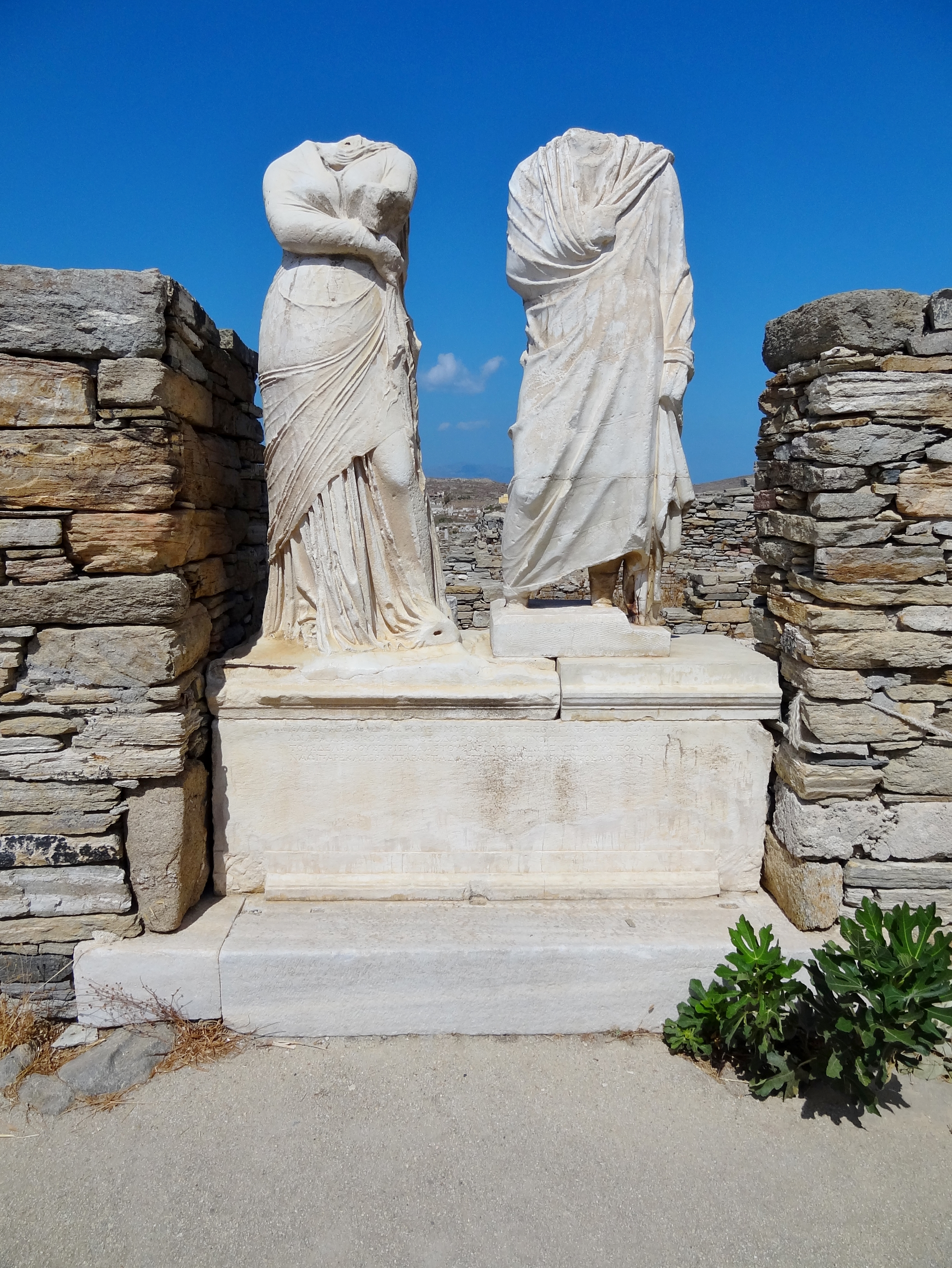 Statuen eines Ehepaars, der Athenerin Kleopatra und ihres Gatten Dioskurides (138/137 v. Chr.), im Haus der Kleopatra im Theaterviertel auf Delos, Kykladen, Griechenland